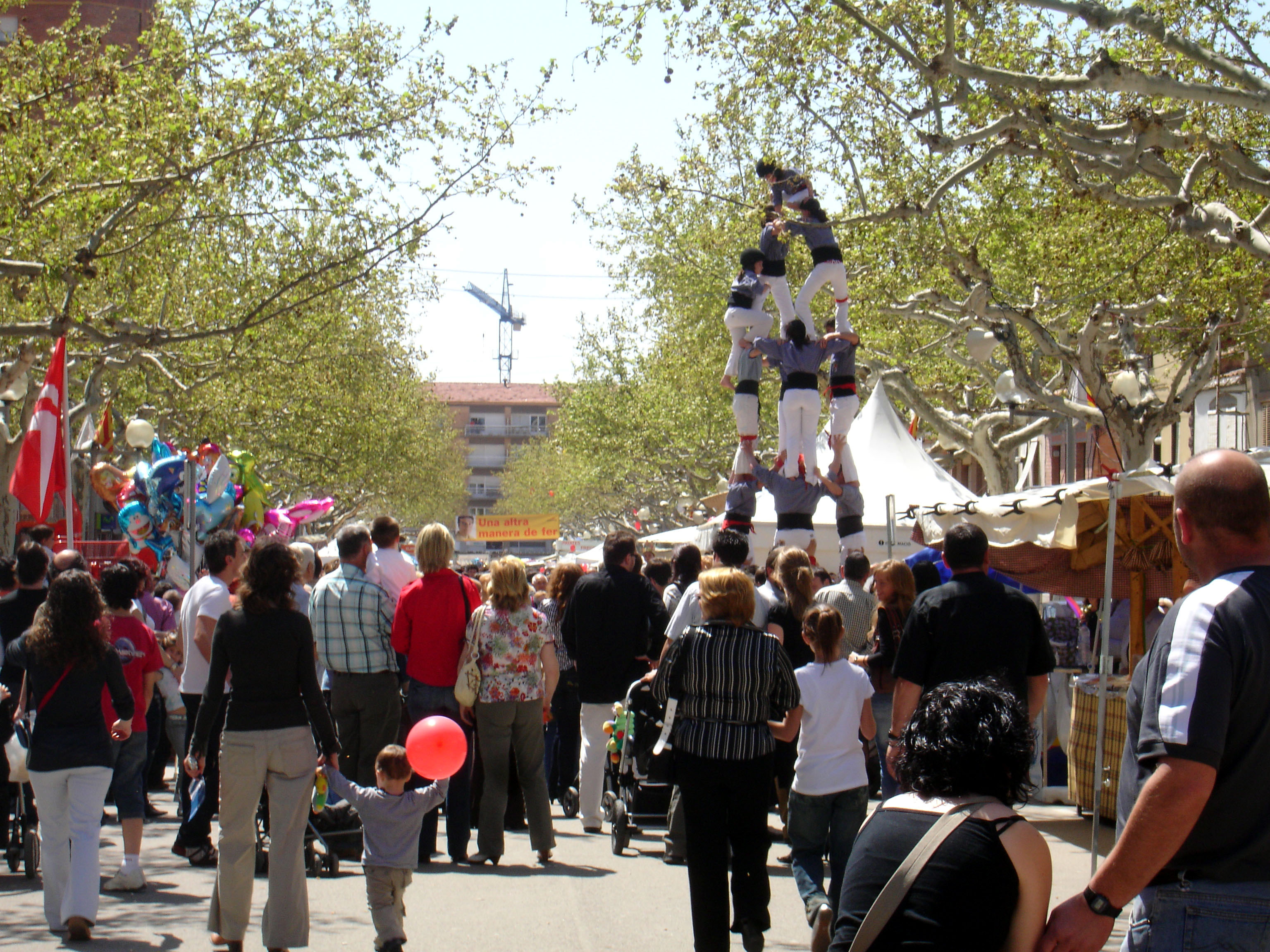 Imatge de la Fira de Primavera de Navàs. 4 de 6 dels Tirallongues de Manresa